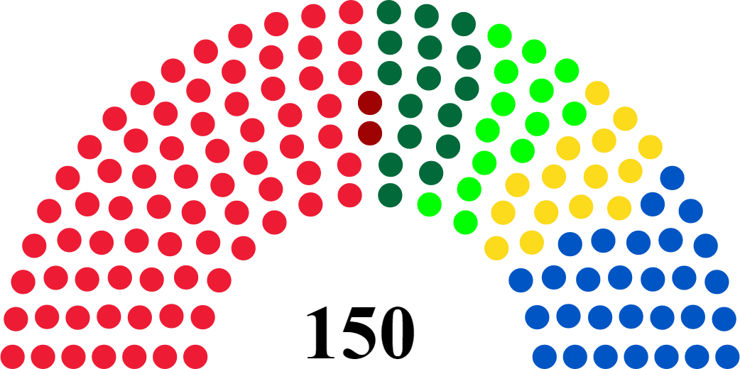 Mandatfördelning i Stortinget 1961-1965 Vänster-Höger Arbeiderpartiet: 74 mandat Sosialistisk Folkeparti: 2 mandat Senterpartiet: 16 mandat Venstre: 14 mandat Kristelig Folkeparti: 15 mandat Høyre: 29 mandat